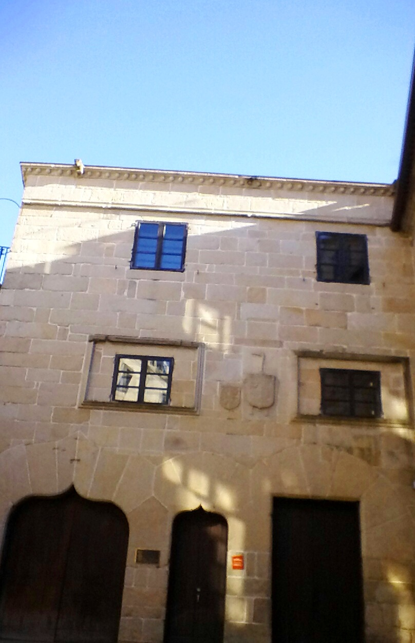 Casa de las Campanas Pontevedra capital. Gótico civil. Escudo medieval de garza en fachada.